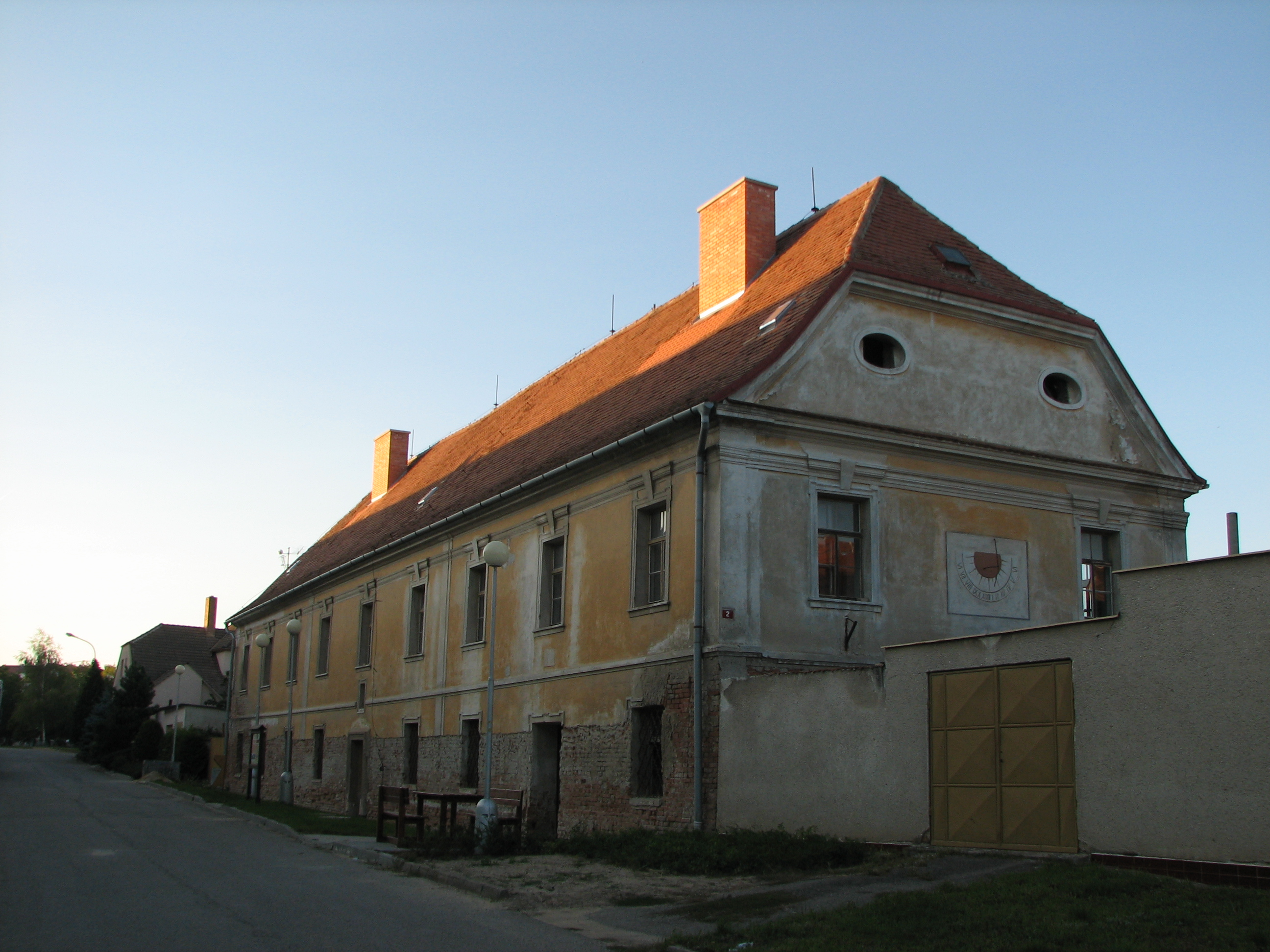 Šardice - biskupská rezidence